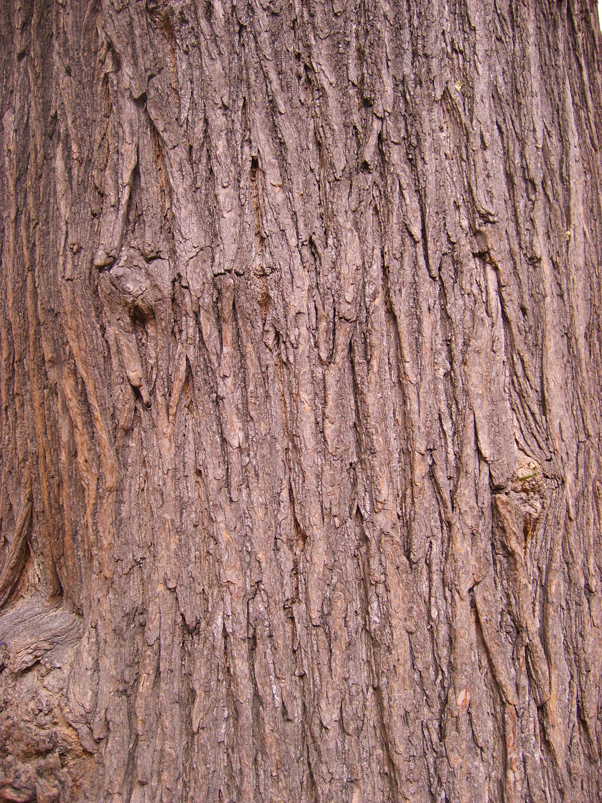 Photographie prise à Paris 18ème